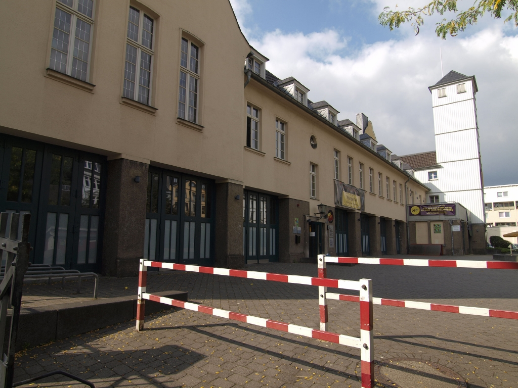 Ehemalige Feuerwehrwache Elberfeld, südlicher Teil. In der Straße Gathe 6, Wuppertal, Quartier Nordstadt. Sie ist Station der Themenroute „Fäden, Farben, Wasser, Dampf". Teil Nr. 9.10 der Route Elberfelder Nordstadt - Ostersbaum. Denkmalnr. 3192 This is a photograph of an architectural monument. 3192